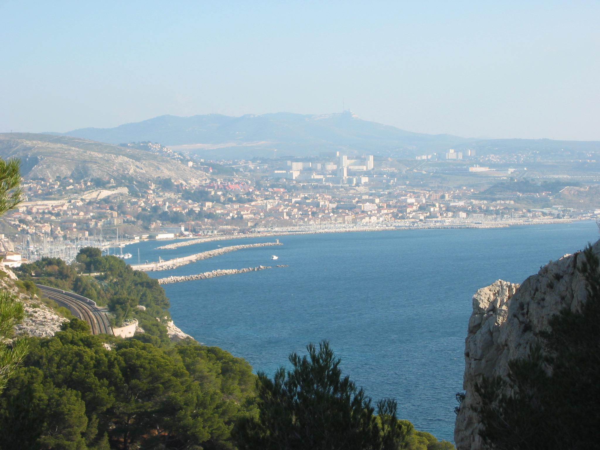 Le quartier de l'Estaque à Marseille (France, Bouches-du-Rhône, 13). Photo prise le 15 janvier 2006, depuis un sentier prÃ¨s du chemin de Resquiadou. Photographe : Ludovic Ruat (